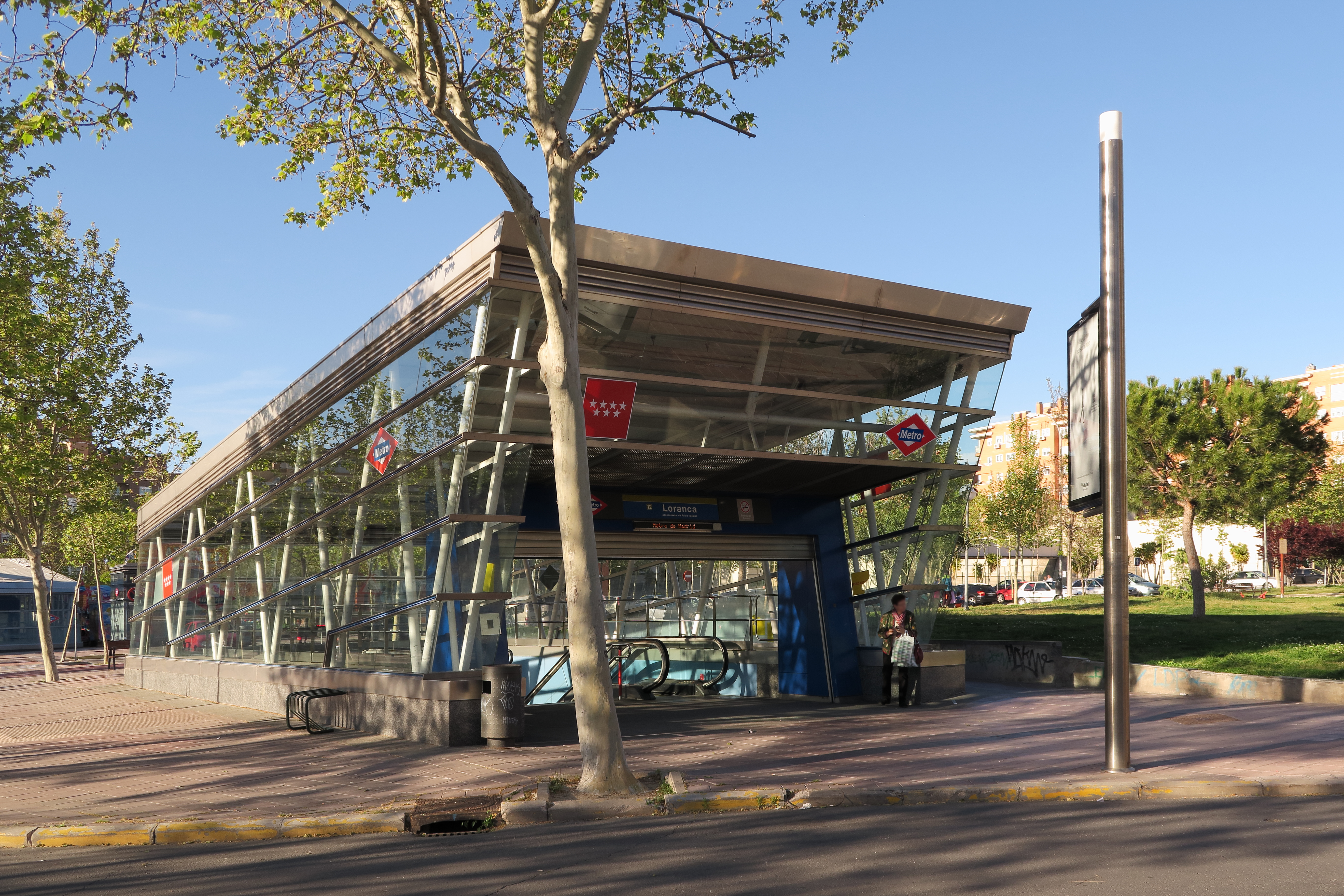 Estación de Loranca, acceso Avenida de Pablo Iglesias